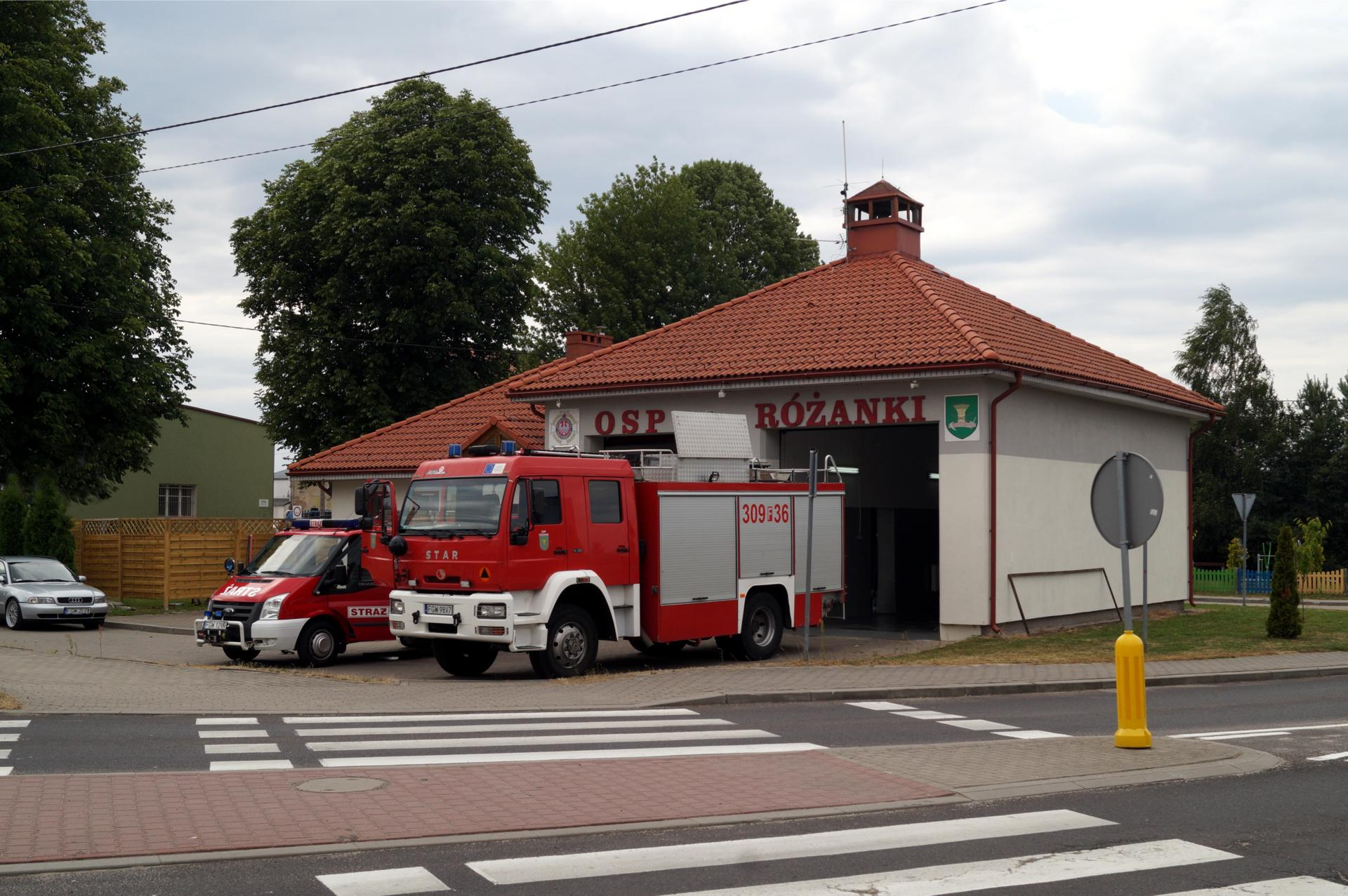 Remiza OSP w Różankach